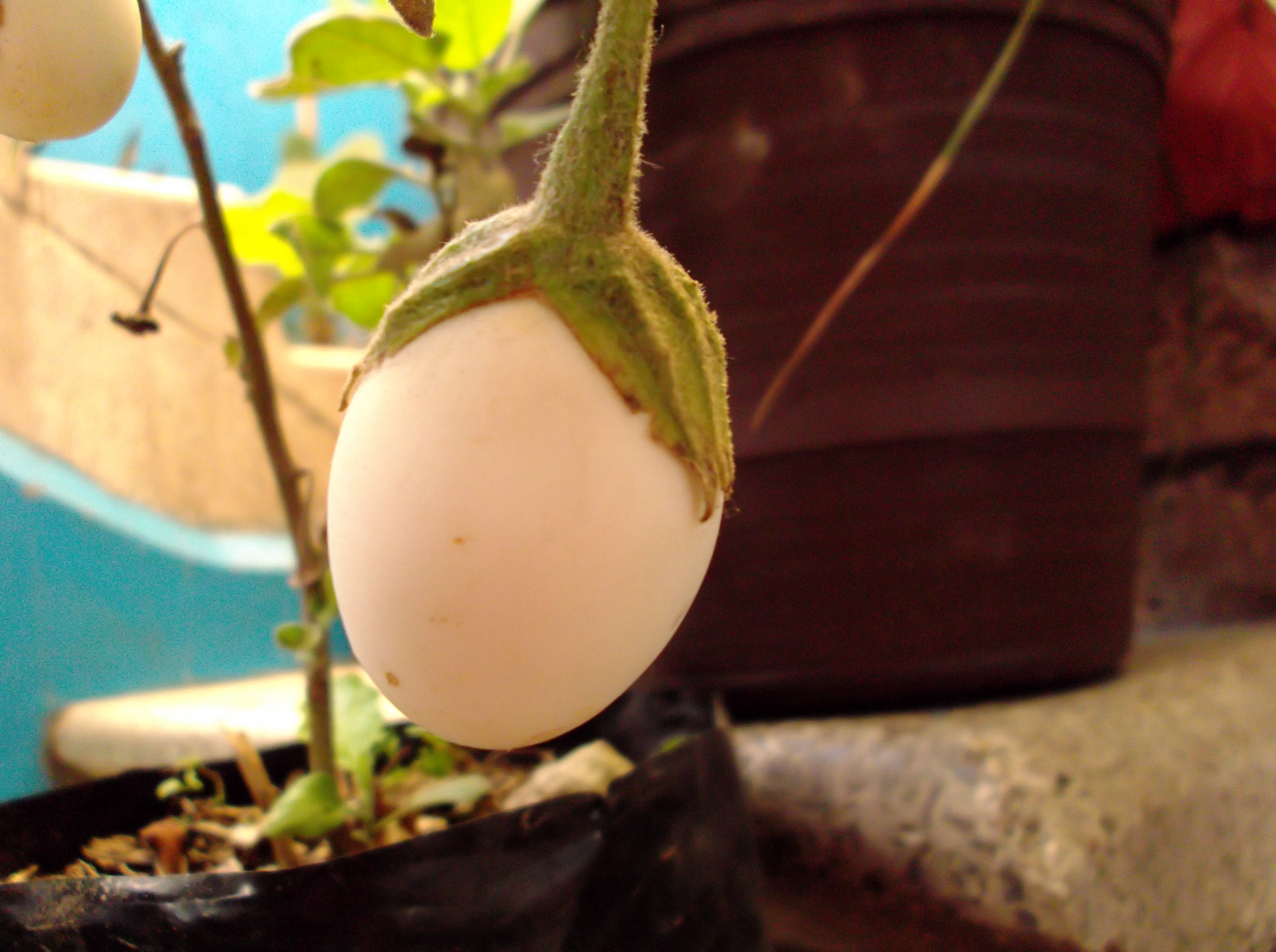 Eggplant (made up, using an egg)